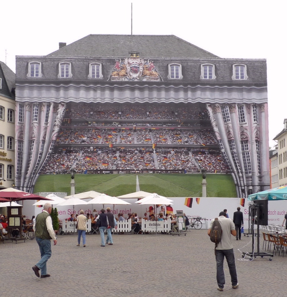 Umhülltes Rathaus Bonn während Umbau- und Sanierungsmaßnahmen